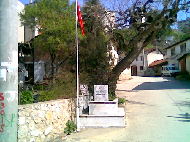 Şehit Mehmet Kabri